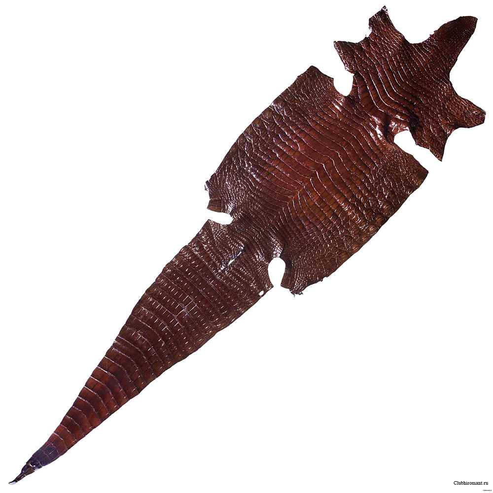 Обувная выделка